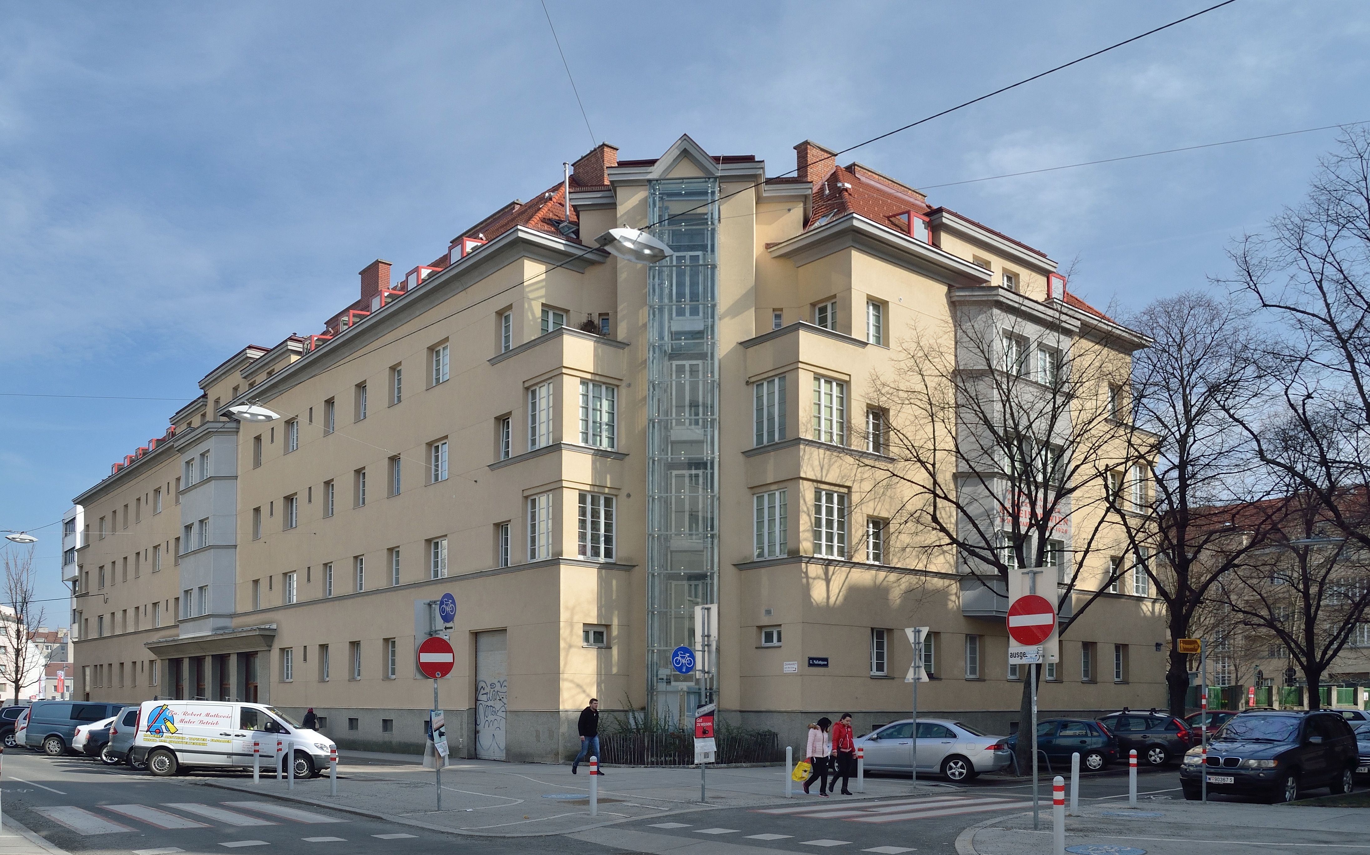 Kommunaler Wohnbau, Fröhlich-Hof. Ansicht von der Arndtstraße.